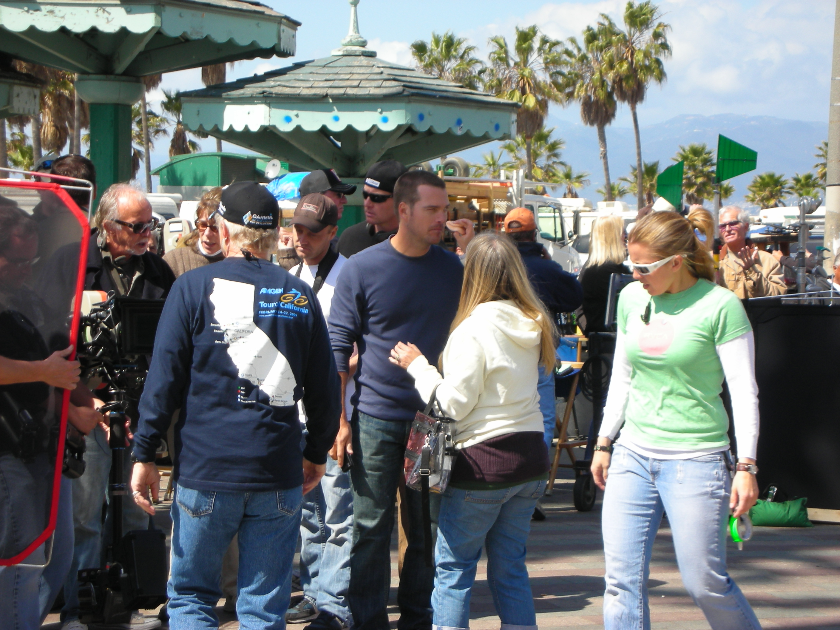 NCIS Filming